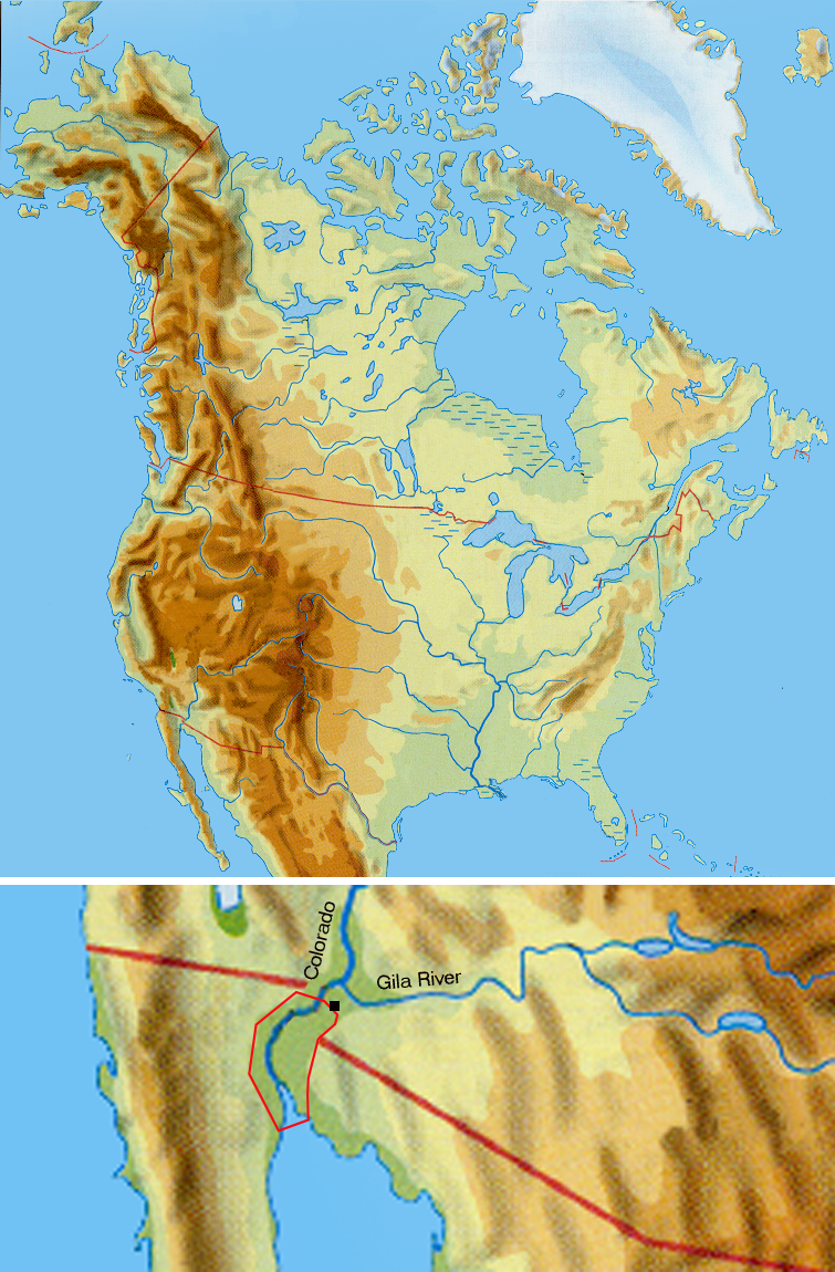 Wohngebiete der Cocopa?